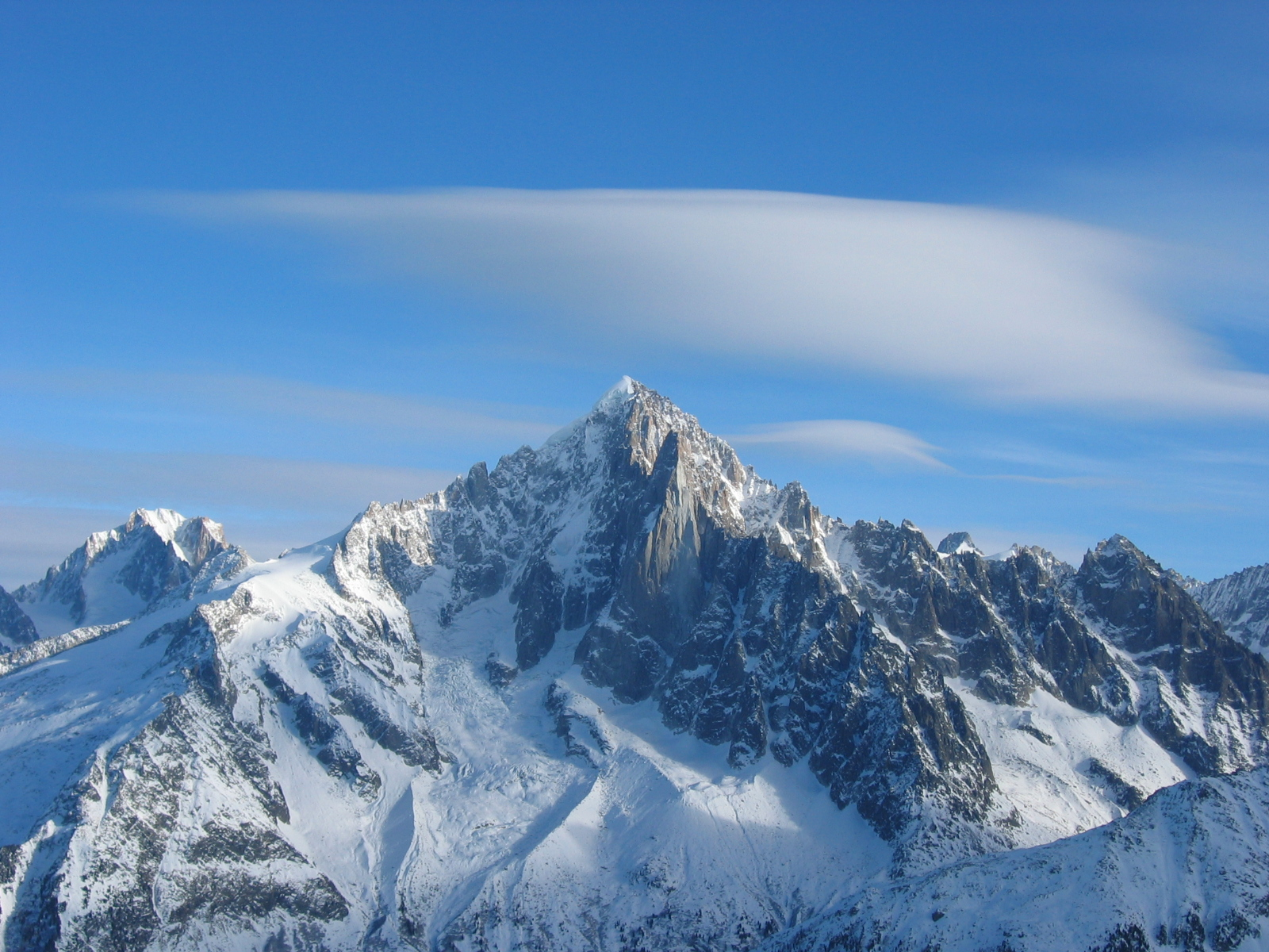 Aiguille Verte, Massif du Mont Blanc